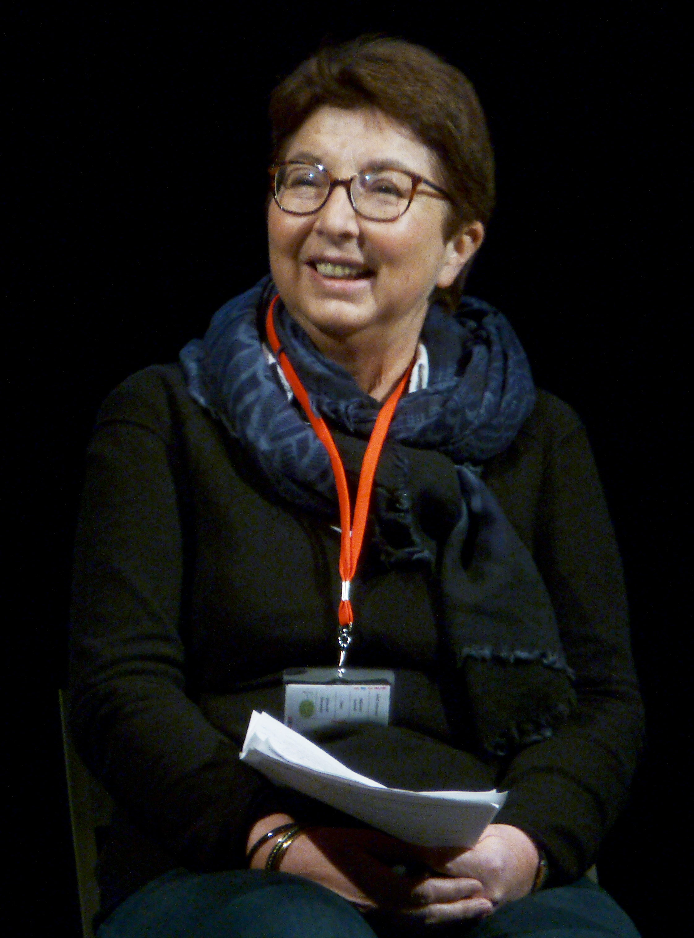 Dominique Quinio en janvier 2015 à Grenoble, lors du rassemblement Ecclesia Campus 2015.